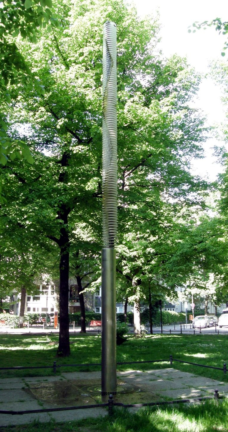 Rolf Lieberknecht: Brunnensäule. 1989, Edelstahl. Fasanenplatz, Berlin-Wilmersdorf